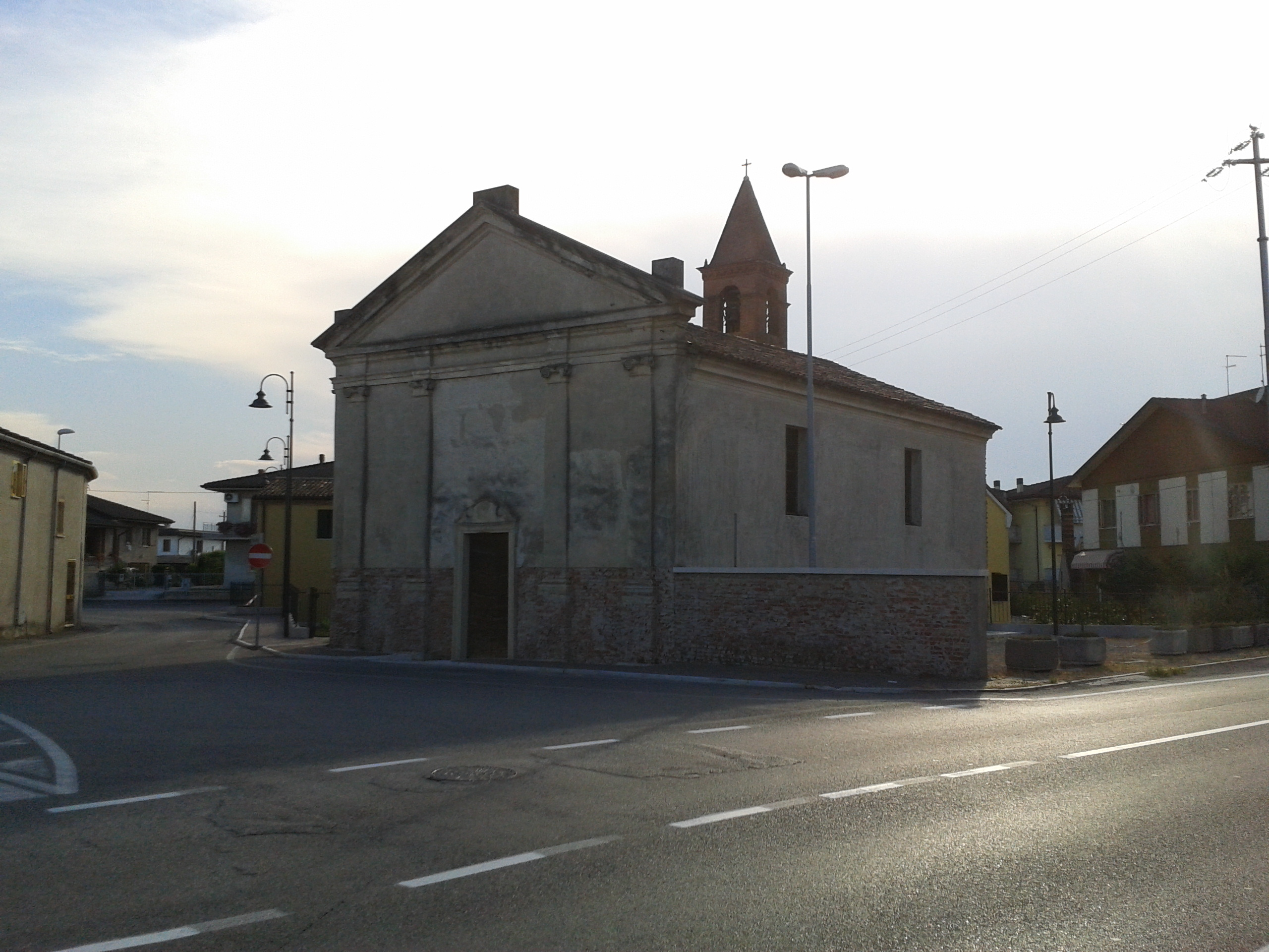 Foto della chiesa di Santa Lucia di Minerbe